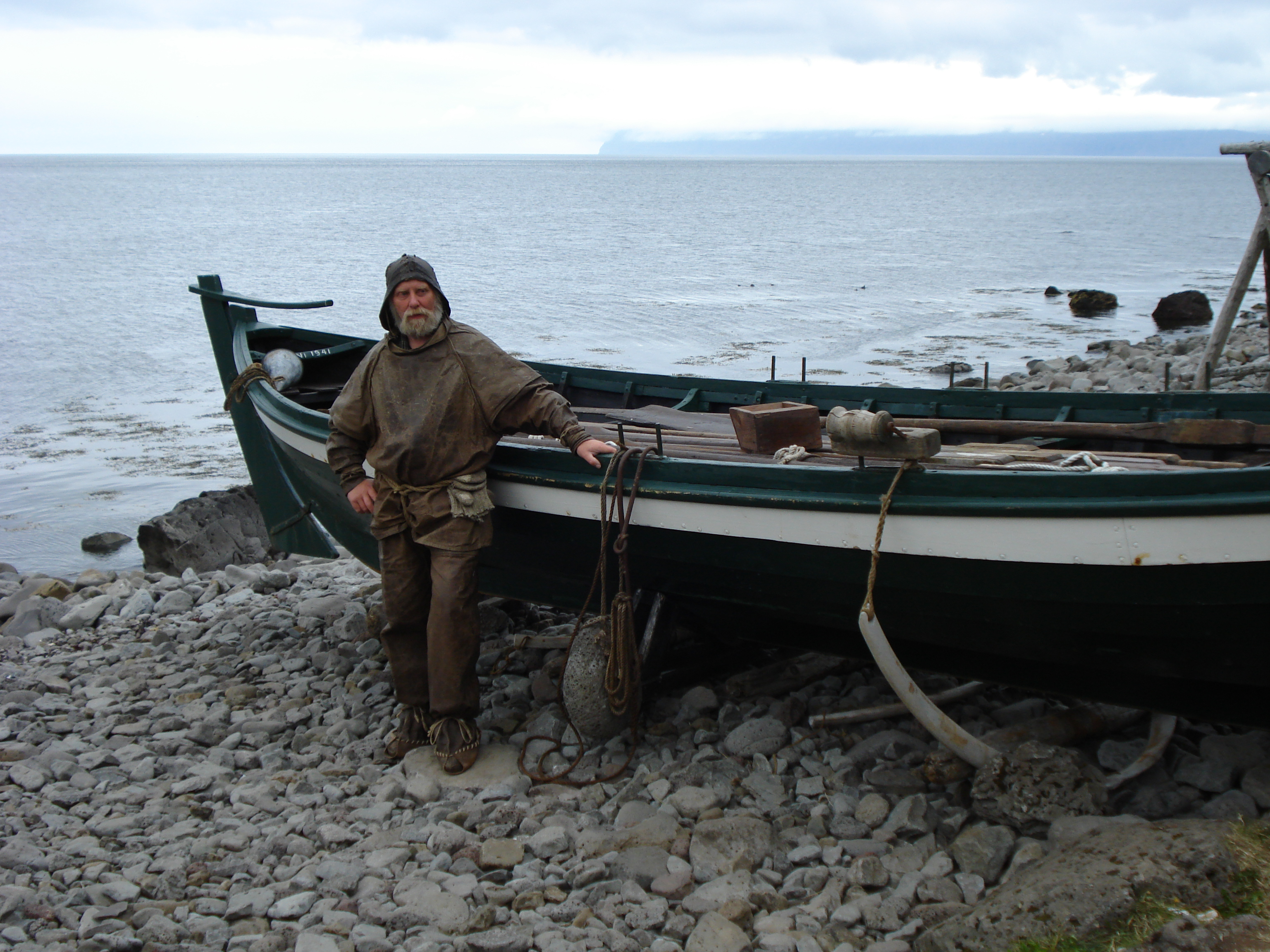 Traditional Fisherman, Bolungavík, Iceland